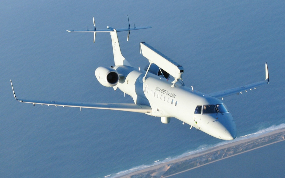 Aeronaves Ágata 7